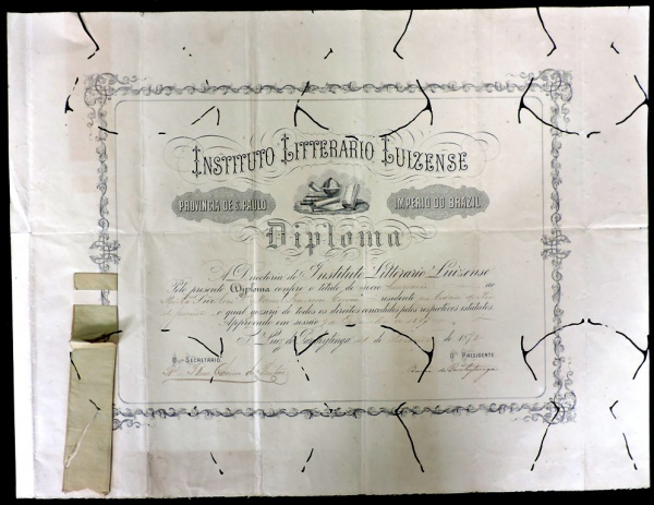 Na imagem, diploma do Instituto Literário Luizense, do ano de 1878, com autógrafo do Barão de Paraitinga, oferecido ao conselheiro Manuel Francisco Correa.